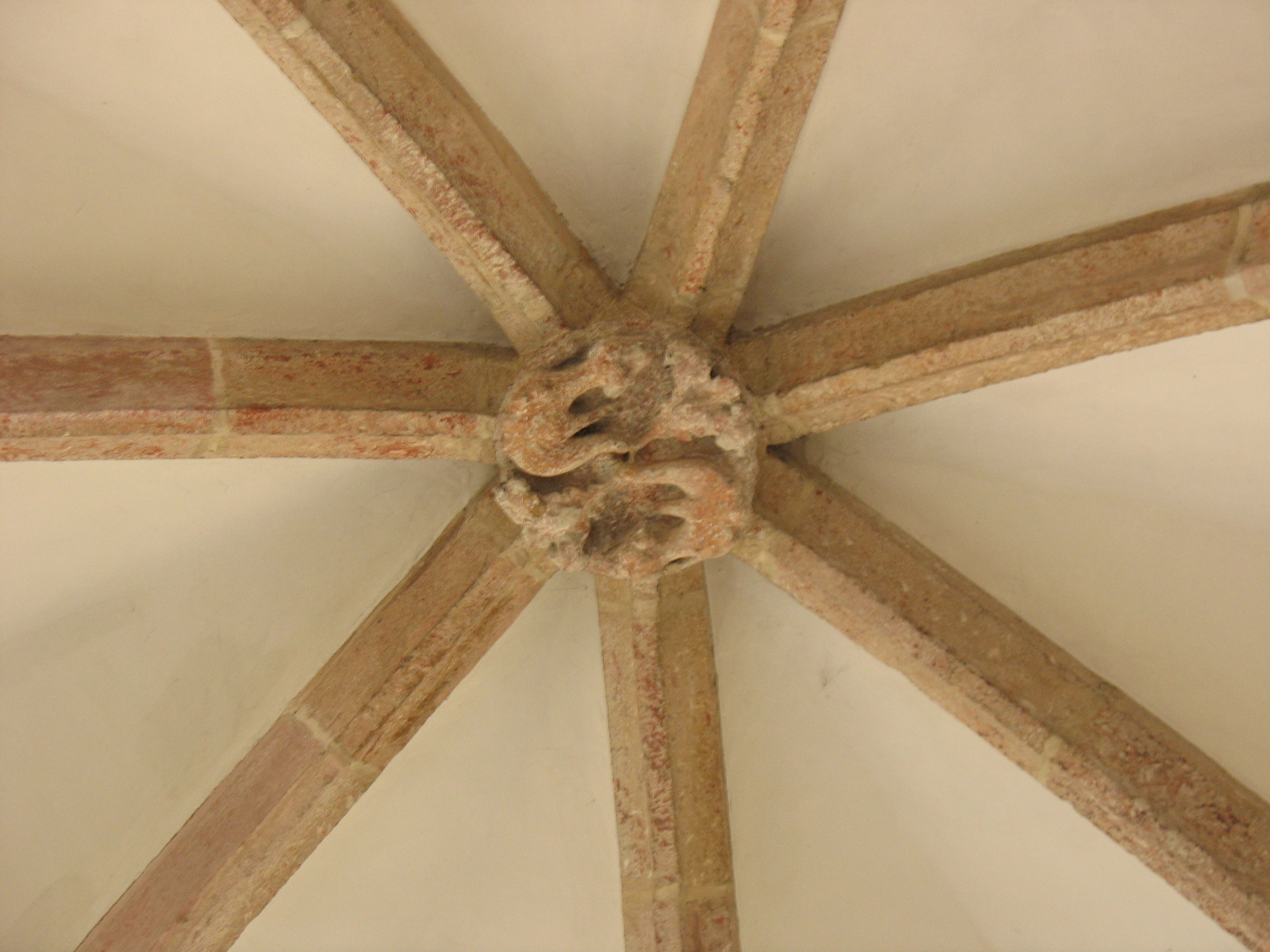 Plauen, St. Johanniskirche: Schlussstein des Gewölbes in der Kapelle der Vögte